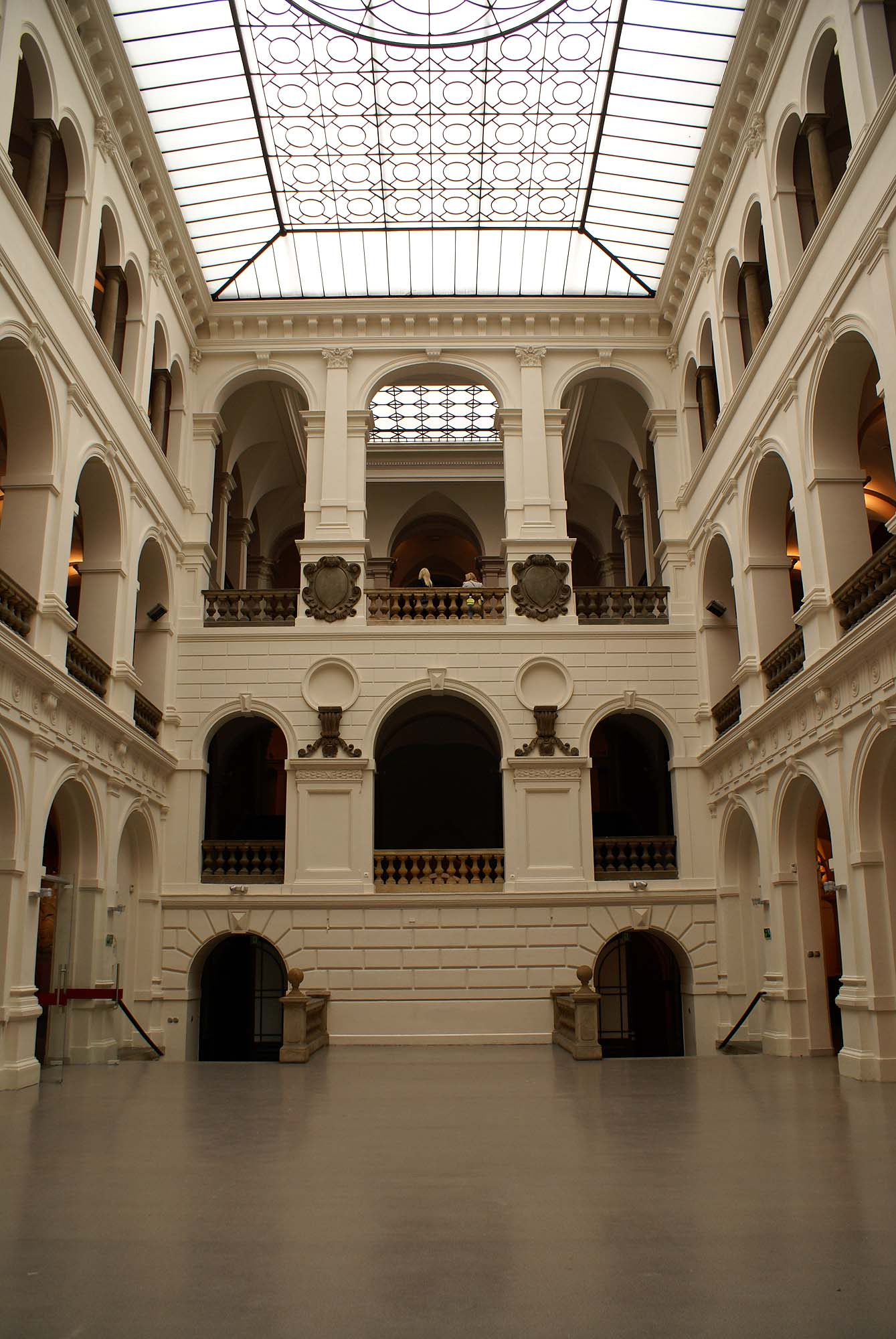 Wrocław, gmach Muzeum Narodowego, 1883-1886